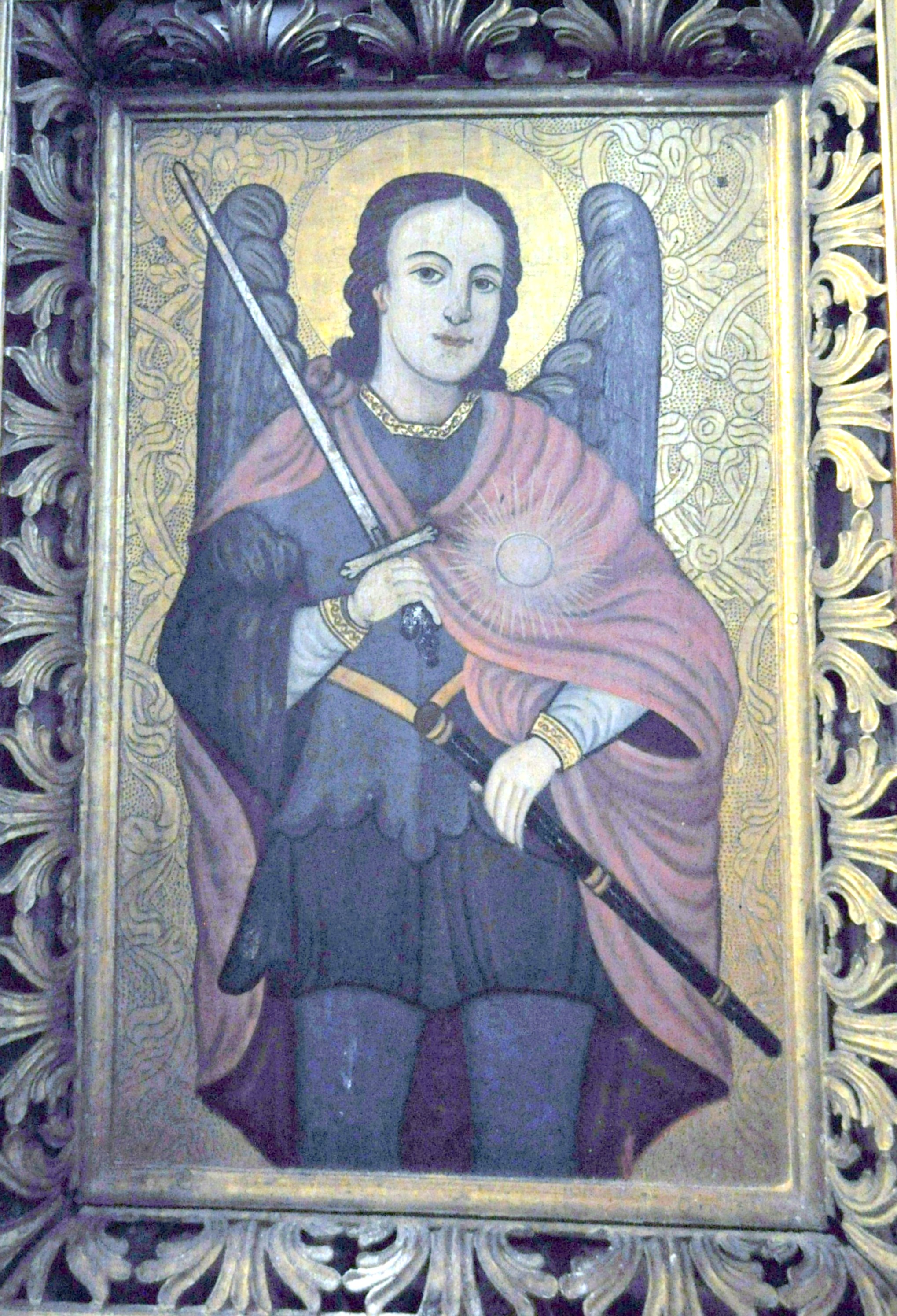 Biserica de lemn "Cuvioasa Paraschiva", sat IZVOARELE; comuna CERNEŞTI